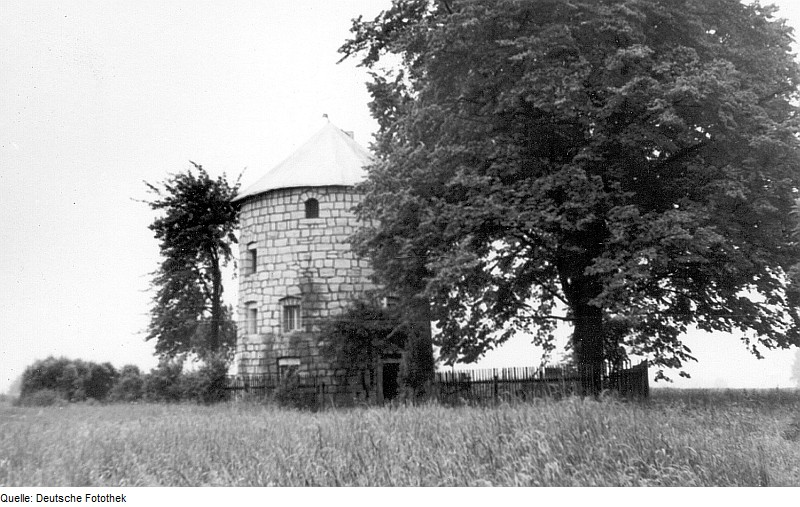 Original image description from the Deutsche FotothekJanovice (Johnsdorf). Turmholländer